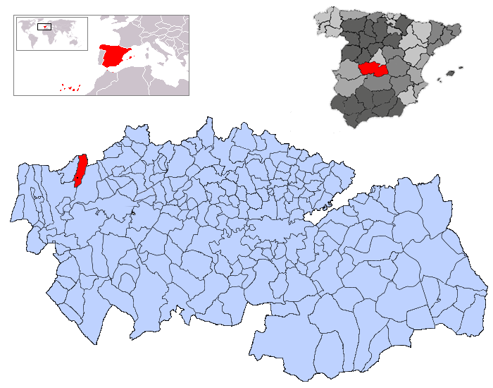 Parrillas en la provincia de Toledo